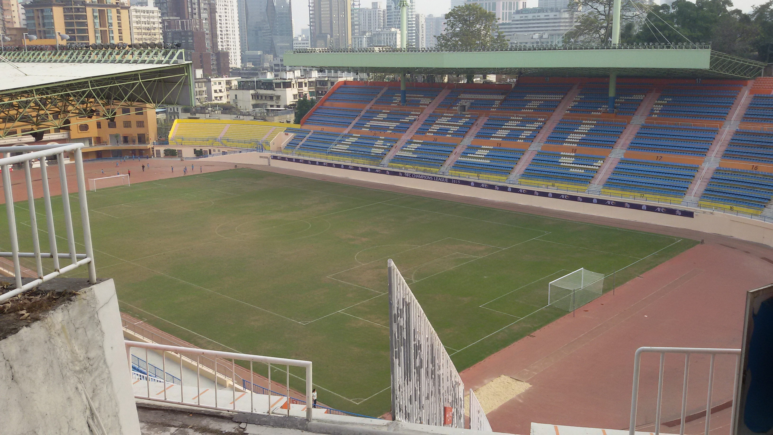 粵語: 越秀山體育場